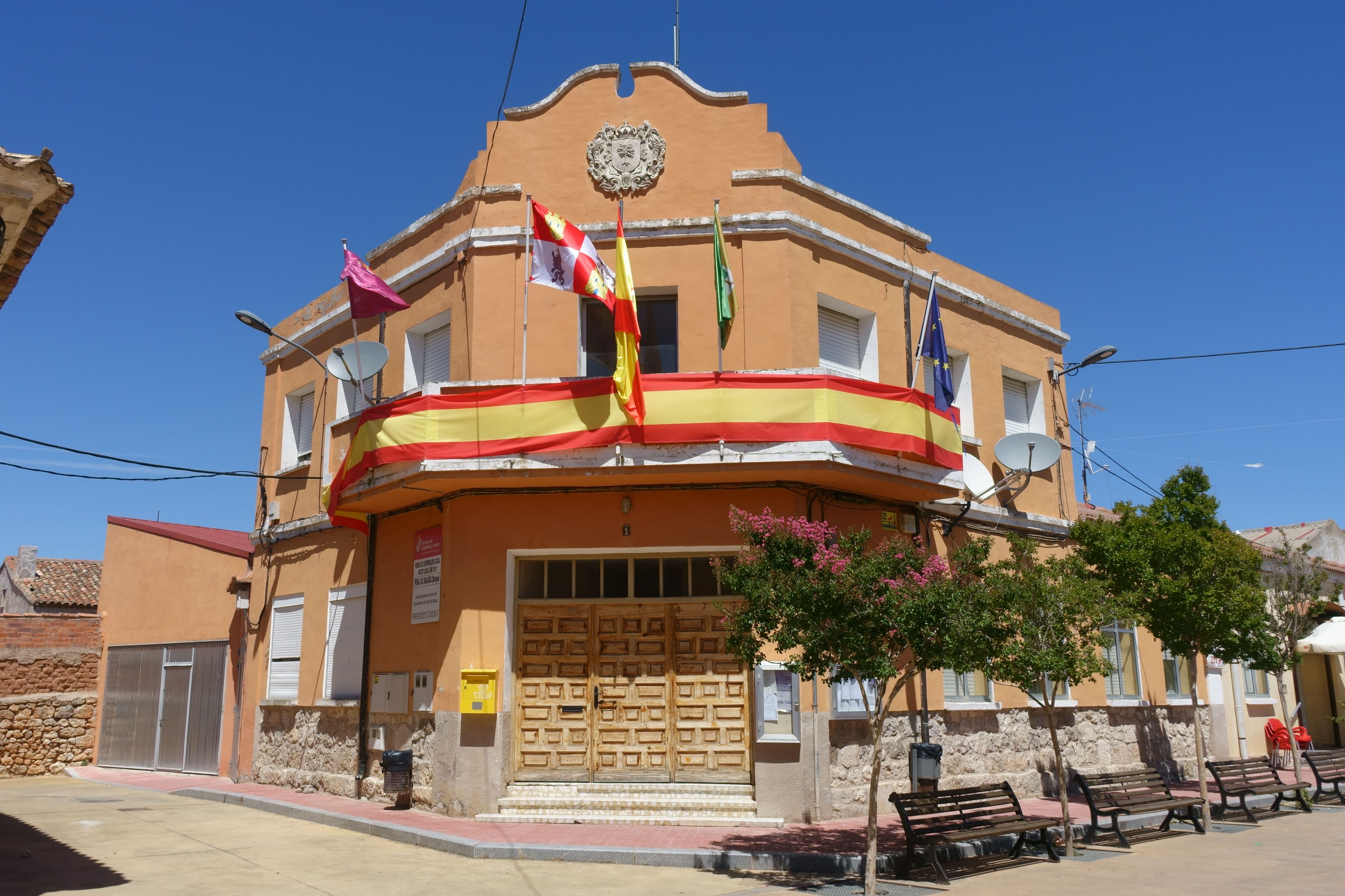 Casa consistorial de Peral de Arlanza (Burgos, España).